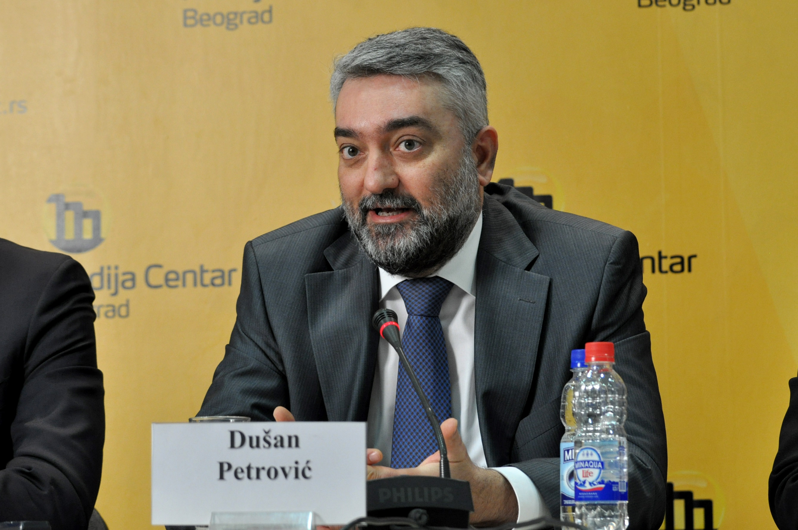 Dušan Petrović 2014